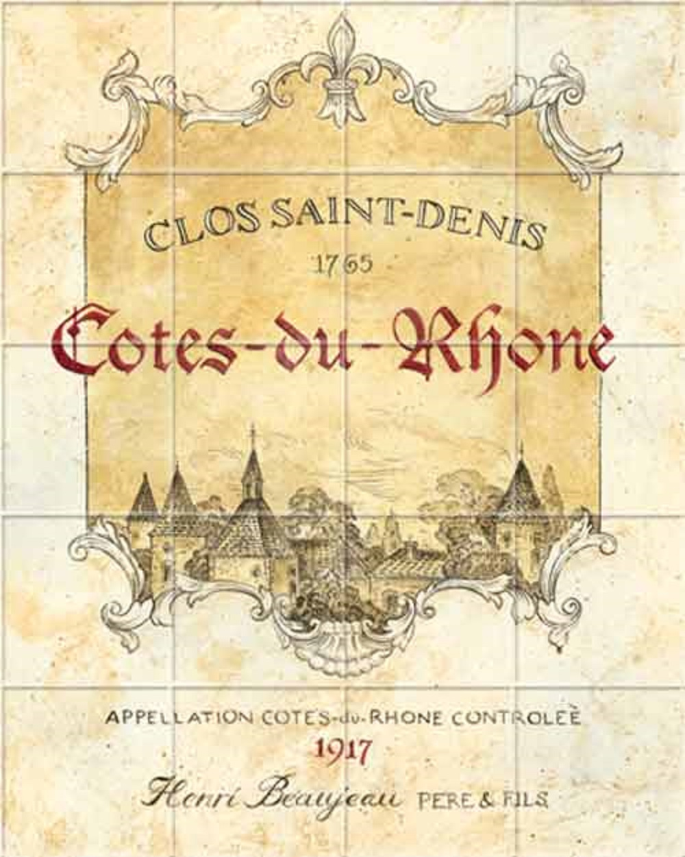 étiquette de vin des côtes-du-rhône de 1917 utilisée par un négociant de Bourgogne